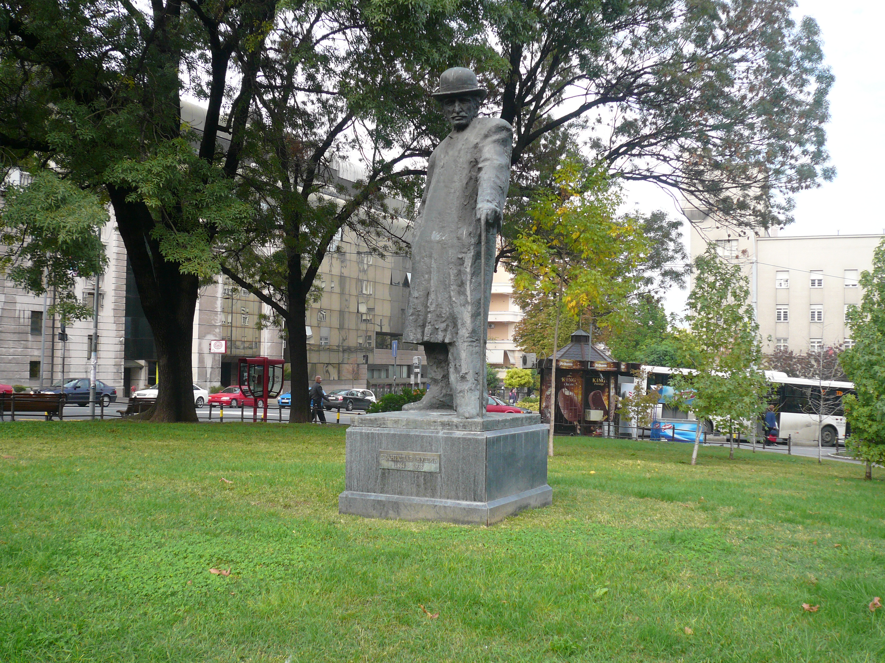 Памятник Браниславу Нушичу в Белграде